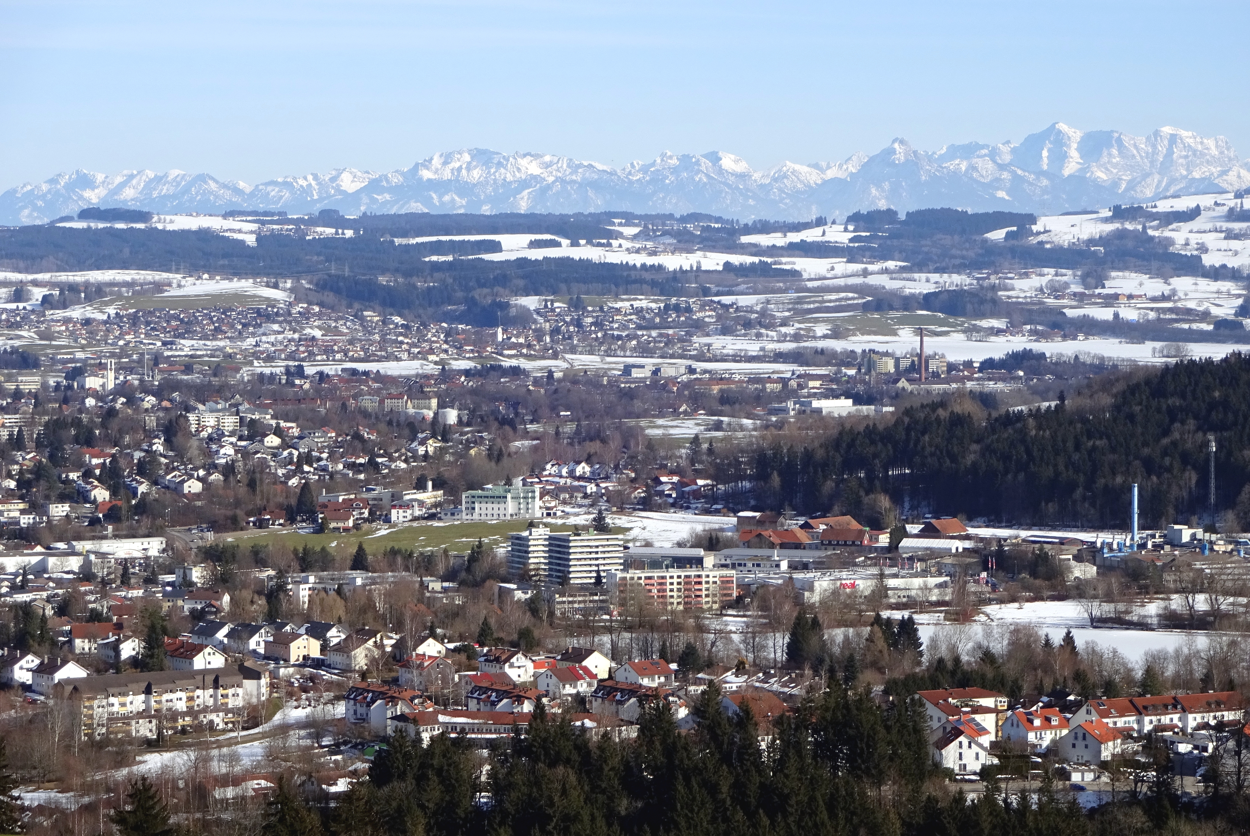 März 2015